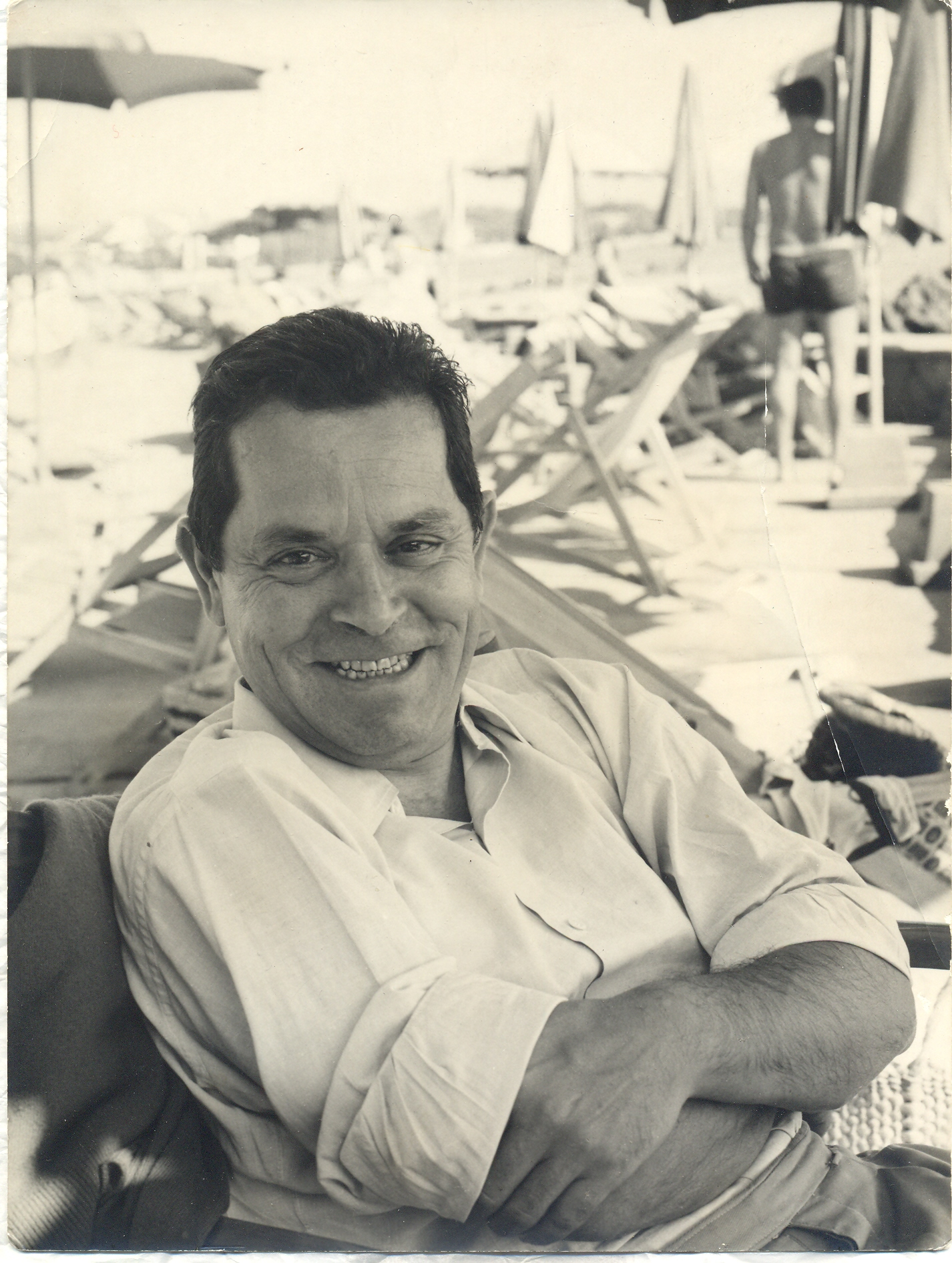 L'urbanista italiano Michele Valori